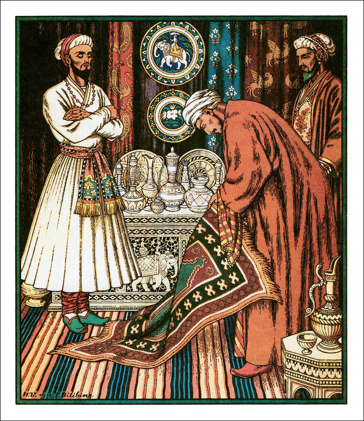 Arabian tale / к арабским сказкам "Тысяча и одна ночь", 1934, акварель